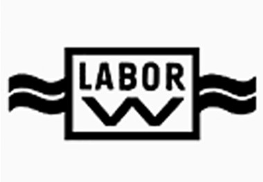 Labor W